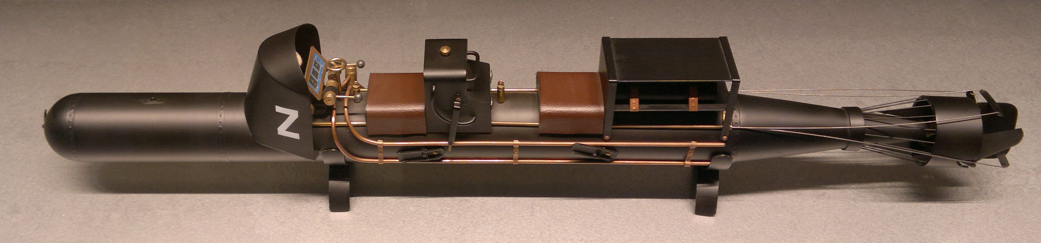 Maqueta d'un torpede humà (Girona)